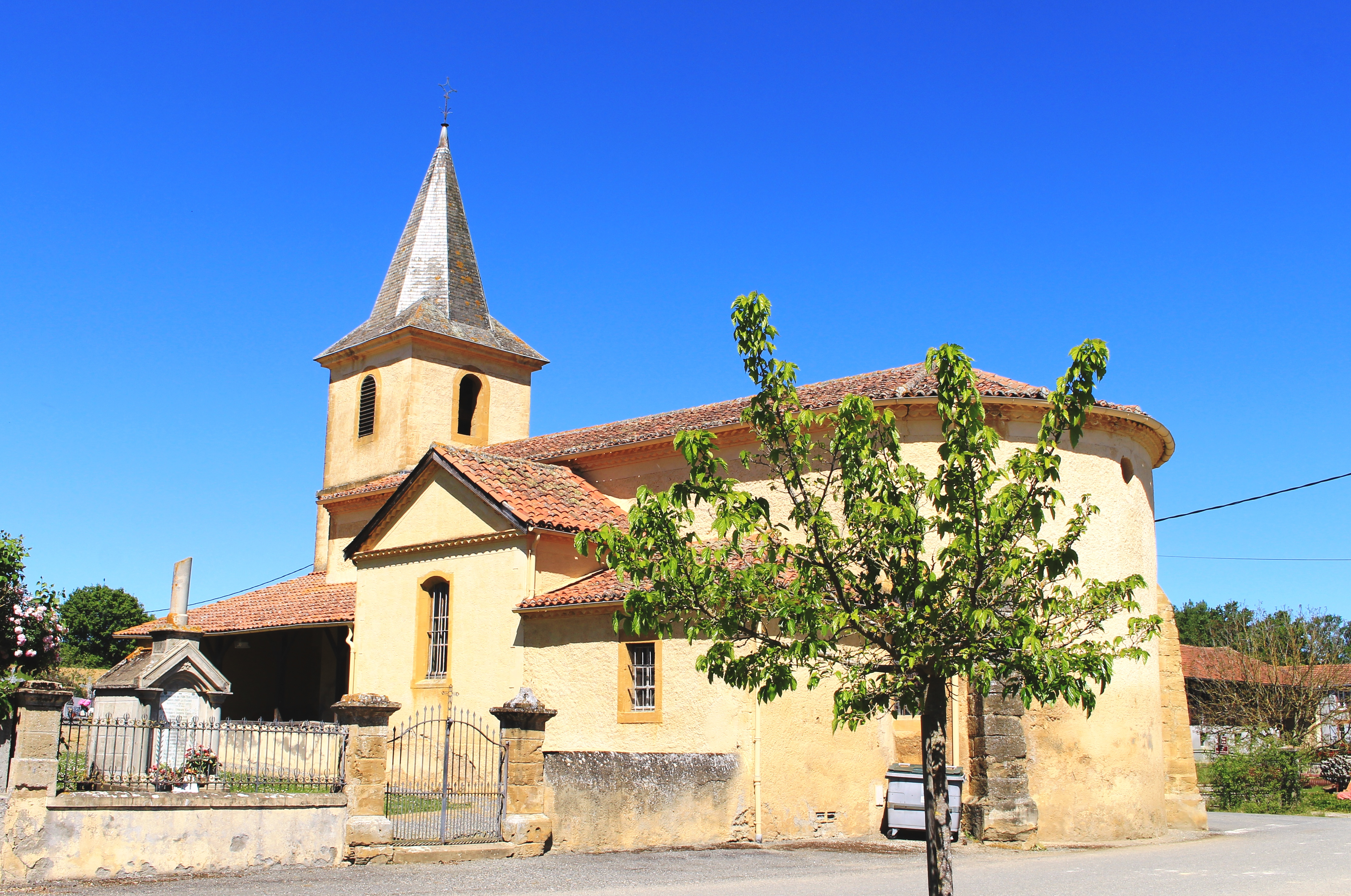 Église Martyre-de-Saint-Jean-Baptiste de Fontrailles (Hautes-Pyrénées)